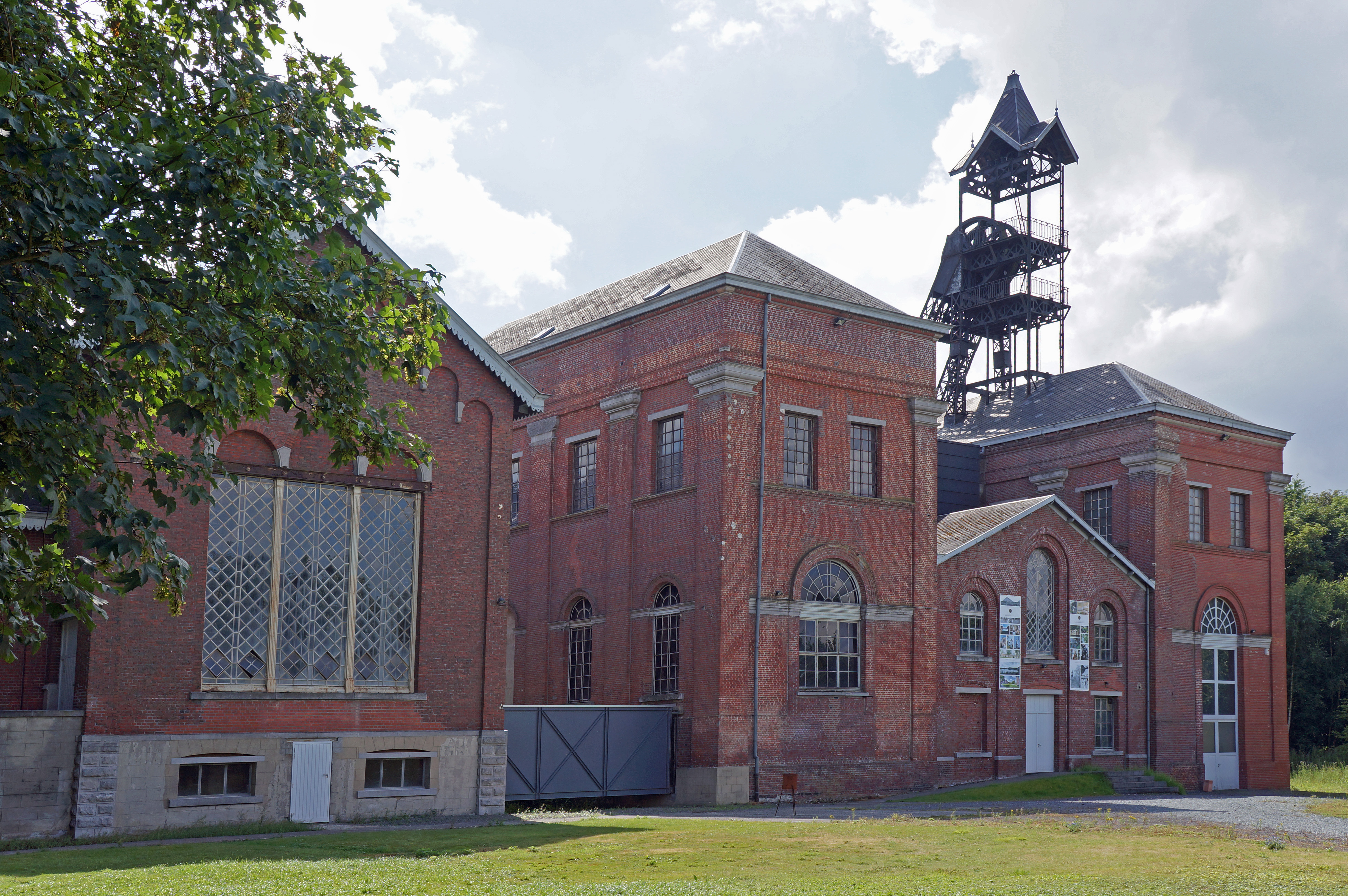 Le Bois-du-Luc, charbonnage.